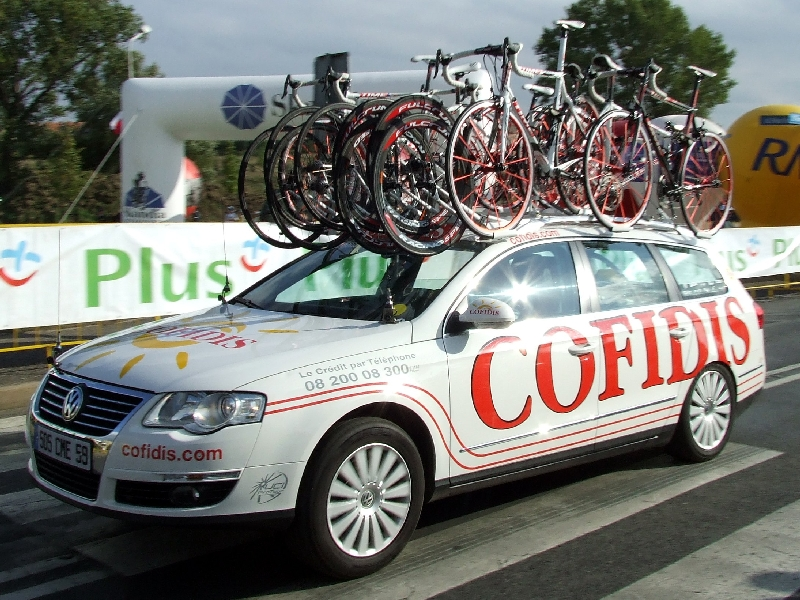 Piąty etap 64. Tour de Pologne: Września - Świdnica Licensing: This image or multimedia was created by Bartosz Senderek. The image or audio is licensed under CC-BY license. Attribution to me is required. Licencja: Ten obrazek lub plik multimedialny został stworzony przez Barotsza Senderka. Został on udostępniony na licencji CC-BY. Informacja o moim autorstwie jest wymagana. "I want to use the image/multimedia. How can I do that?" You can use this image/multimedia freely for any purpose, including commercial use, provided that you license it under the above license. My suggestion is to use text shown below: If you use the image I would appreciate it if you would let me know on my talk page, but this is not required as long as you follow the above license. "Chcę użyć tego pliku. Jak mogę to zrobić?" Możesz używać tej grafiki/multimediów darmowo w każdym celu, włączając użycie komercyjne, udostępniając go dalej na powyższej licencji. Jeśli zdecydujesz się na publikację zdjęcia mojego autorstwa obowiązkowo podpisz go w sposób podany w sekcji "Licensing text". Jeżeli użyłeś mojego pliku możesz powiadomić mnie o tym na mojej stronie dyskusji, lecz nie jest to wymagane, dopóki trzymasz się powyższej licencji.